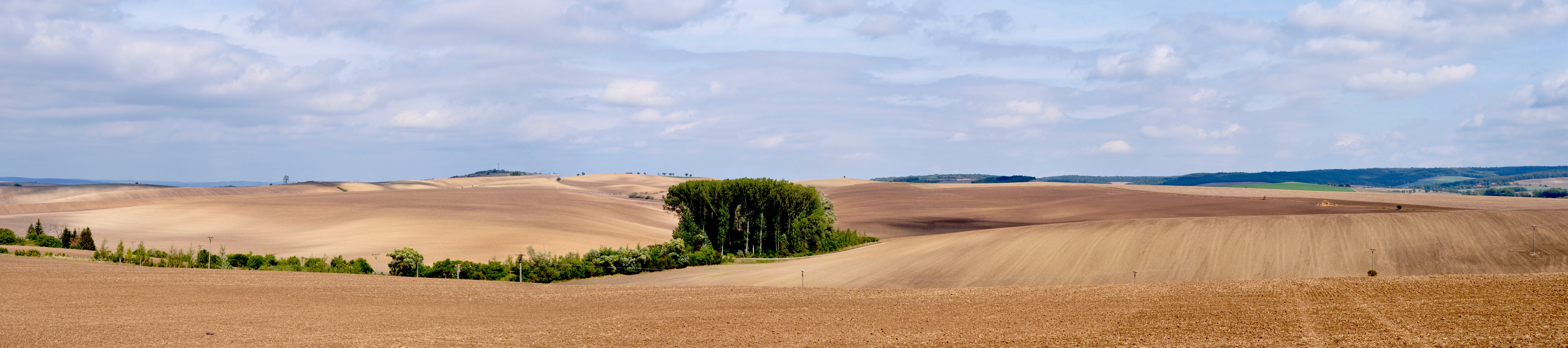 Panorama kulturní krajiny na Šardičkami, pozdní léto 2017